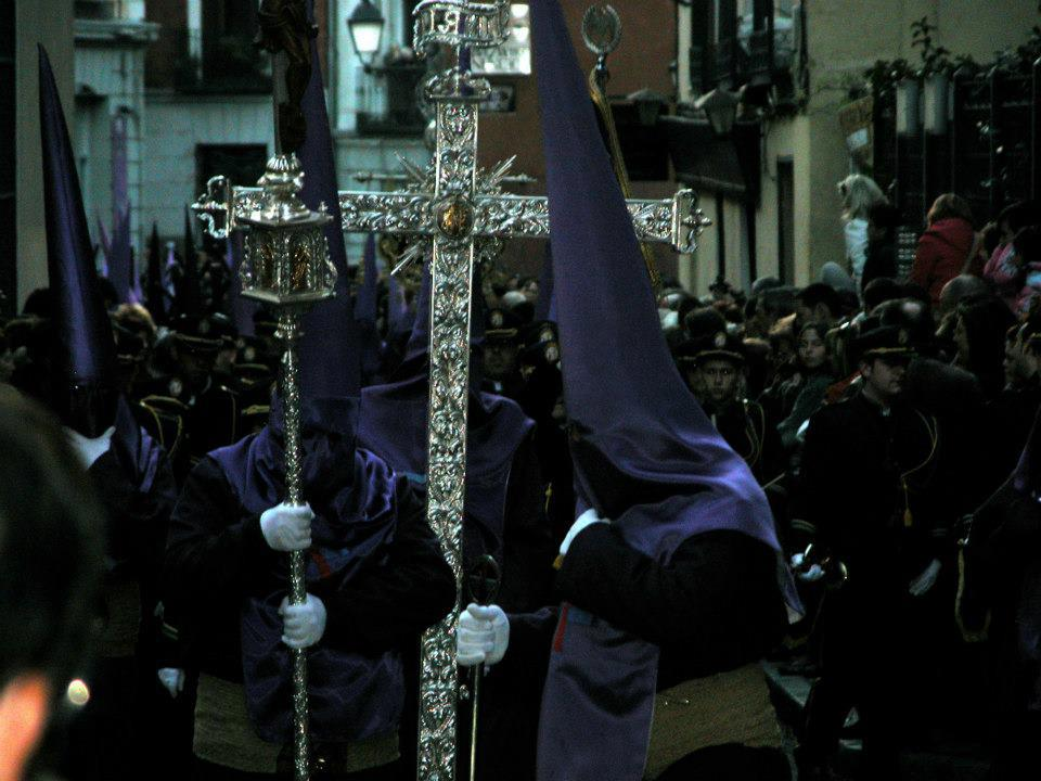 Cruz de Guia y Banda Cornetas y Tambores de la Hermandad de Jesús El Pobre y Maria Santisima del Dulce Nombre